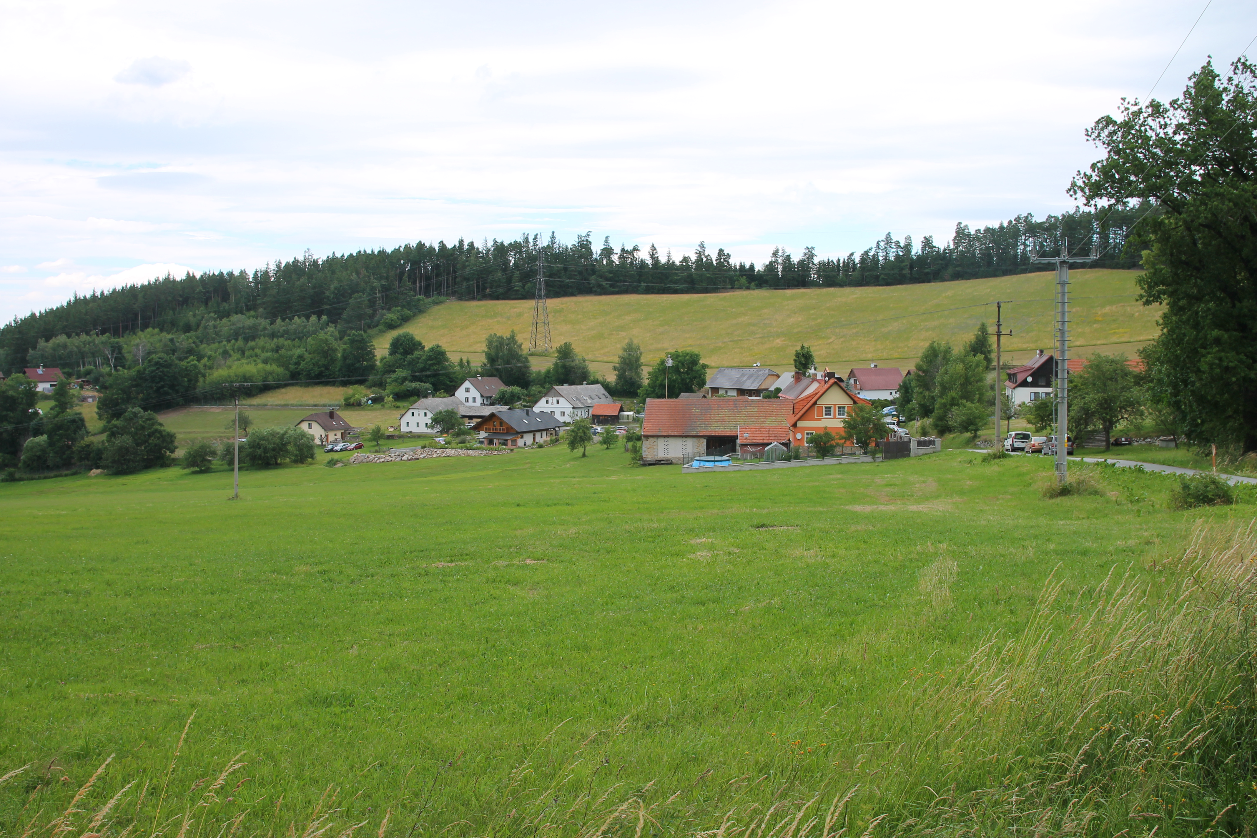 Vícemily, pohled z hlavní silnice II/145